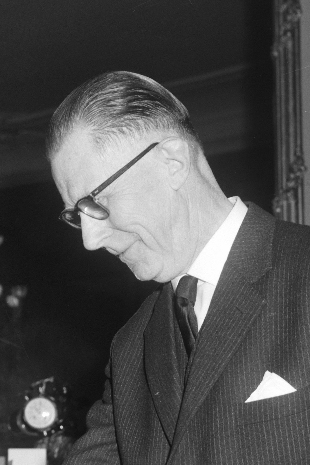 Professor dr. R. W. Zandvoort (rechts) onderscheiding ontvangen van Engelse ambassadeur Andrew Noble in zijn residentie te Den Haag bewezen diensten aan Anglo Nederlandse relaties